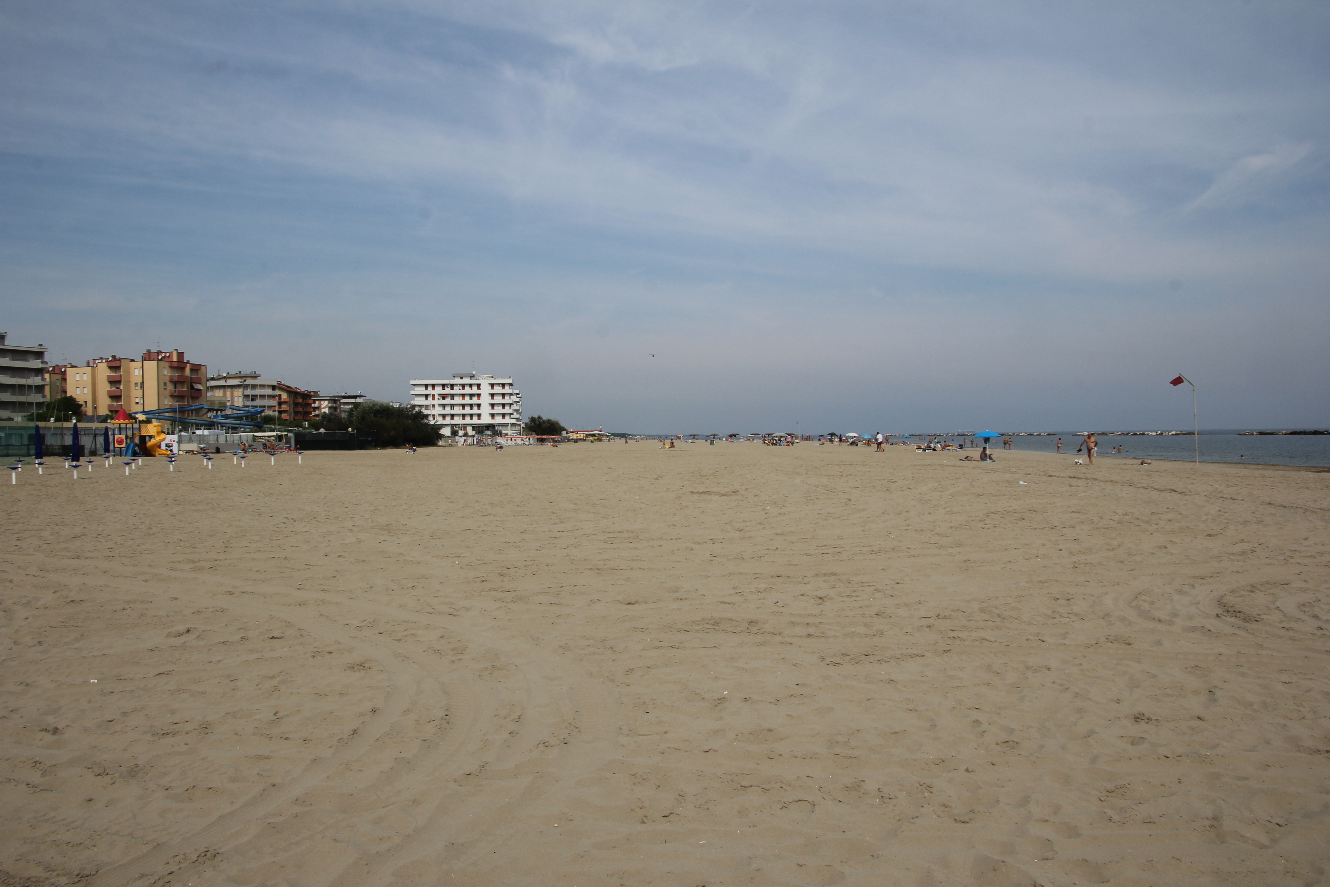 Ravenna, spiaggia di Punta Marina Terme